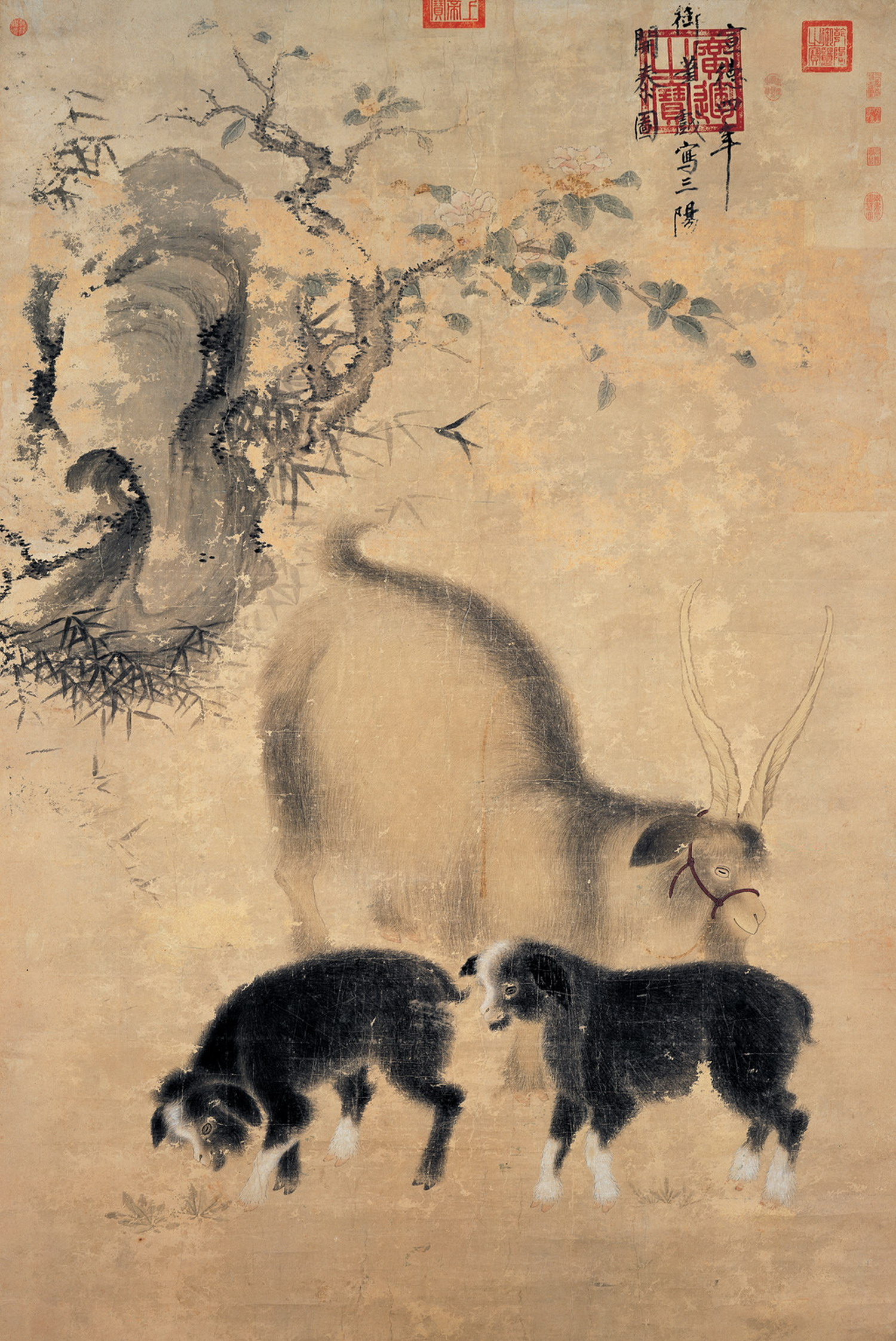 】三阳开泰轴，纸本设色，纵211.6，横142.5公分，国立故宫博物院。